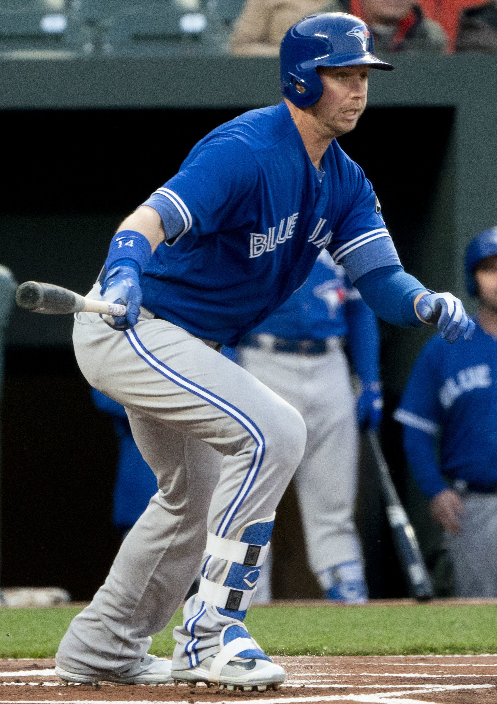 Blue Jays at Orioles 4/11/18